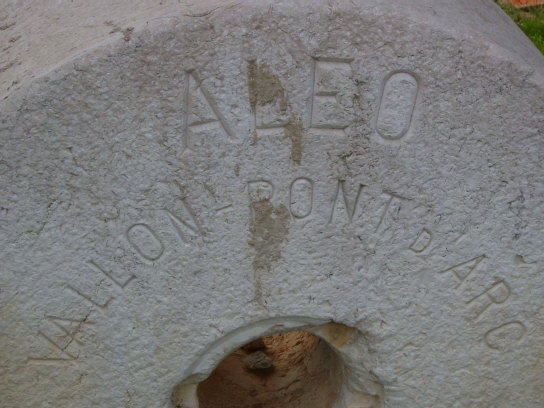 Muelŝtono el Francio en Primoŝteno Muelŝtono sur la antaŭa E-feriejo ĉe Promoŝten (memfarita fot libere uzebla)